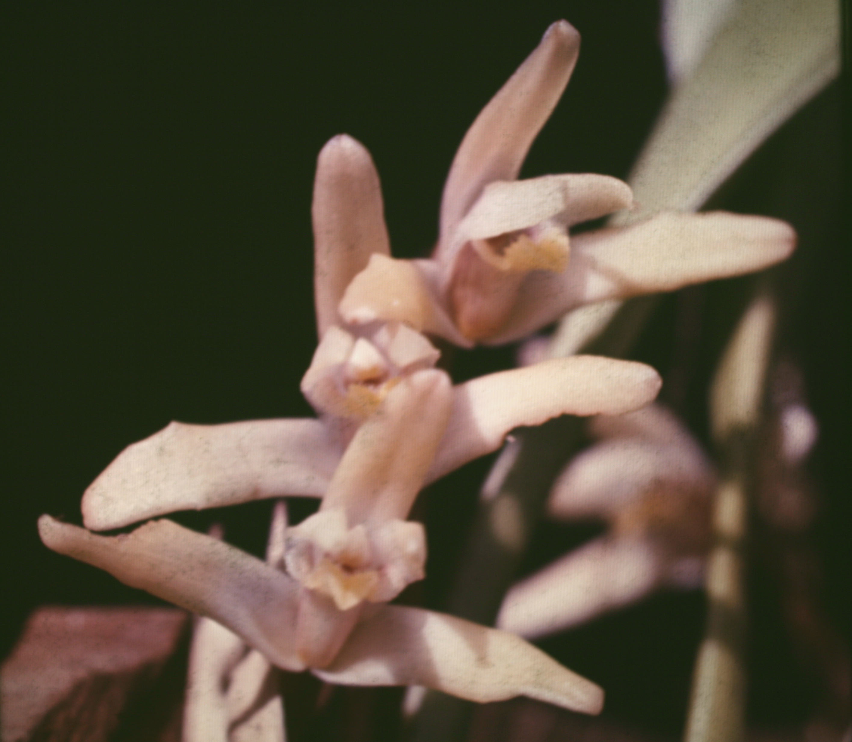 Maxillaria parkeri, Suriname.